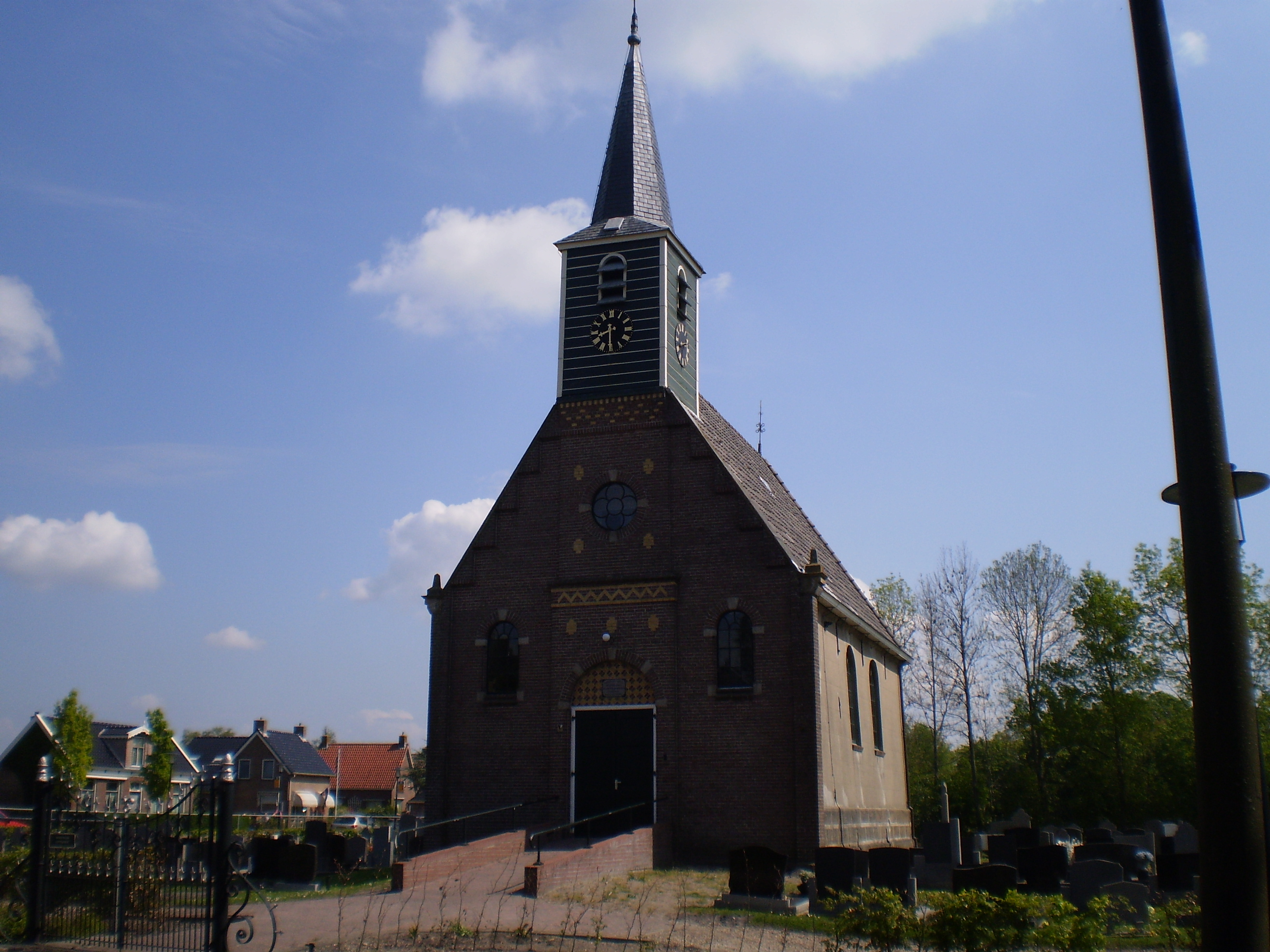 Makke op 2 maaie 2009